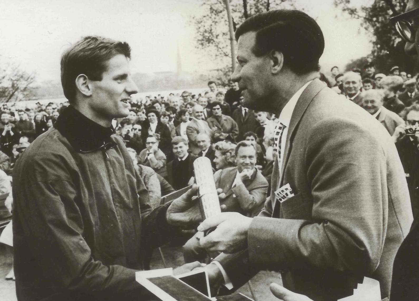 Ehrung Holster Stelzner von Helmut Schmidt